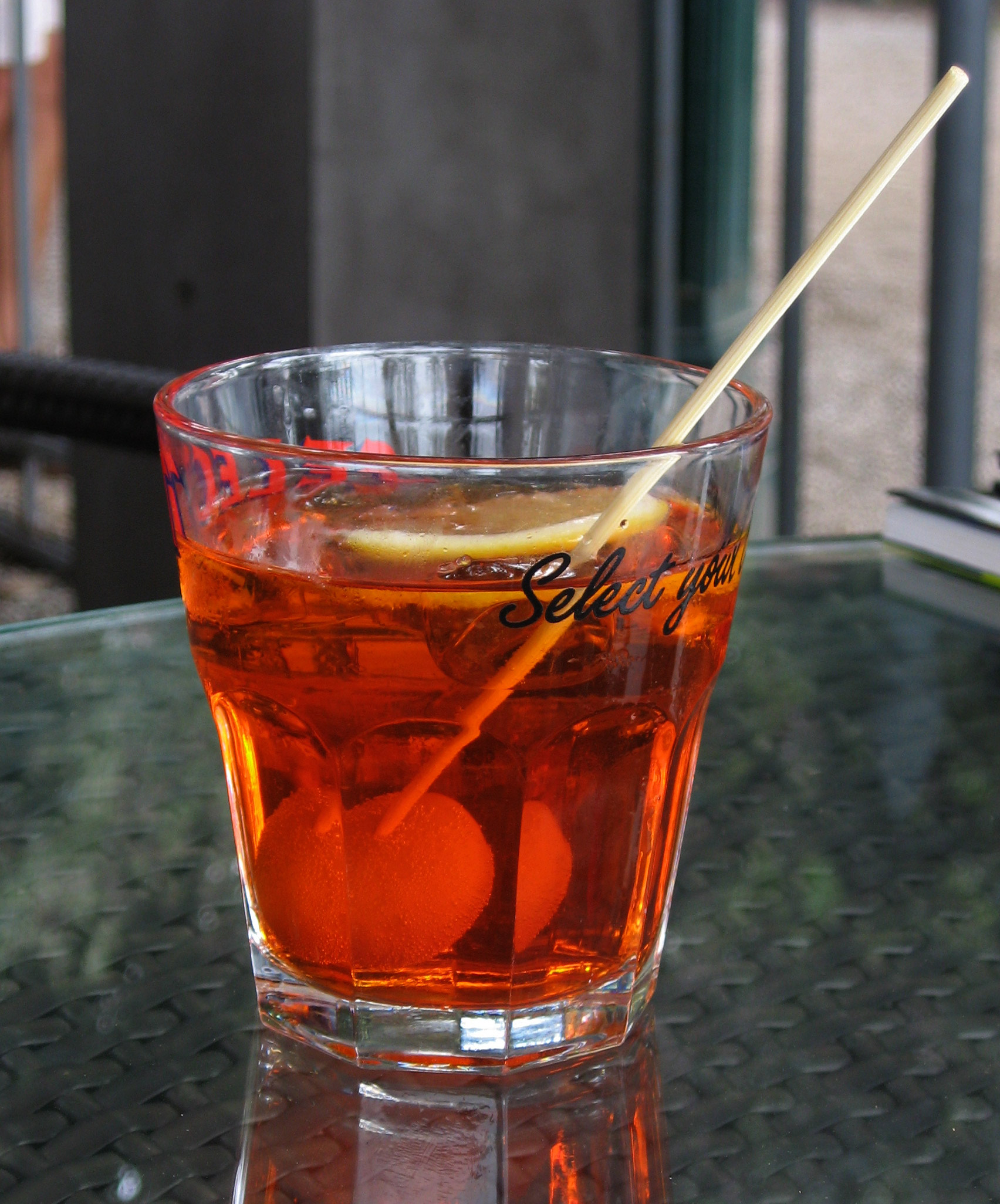 Spritz mit Aperol, serviert in Venedig